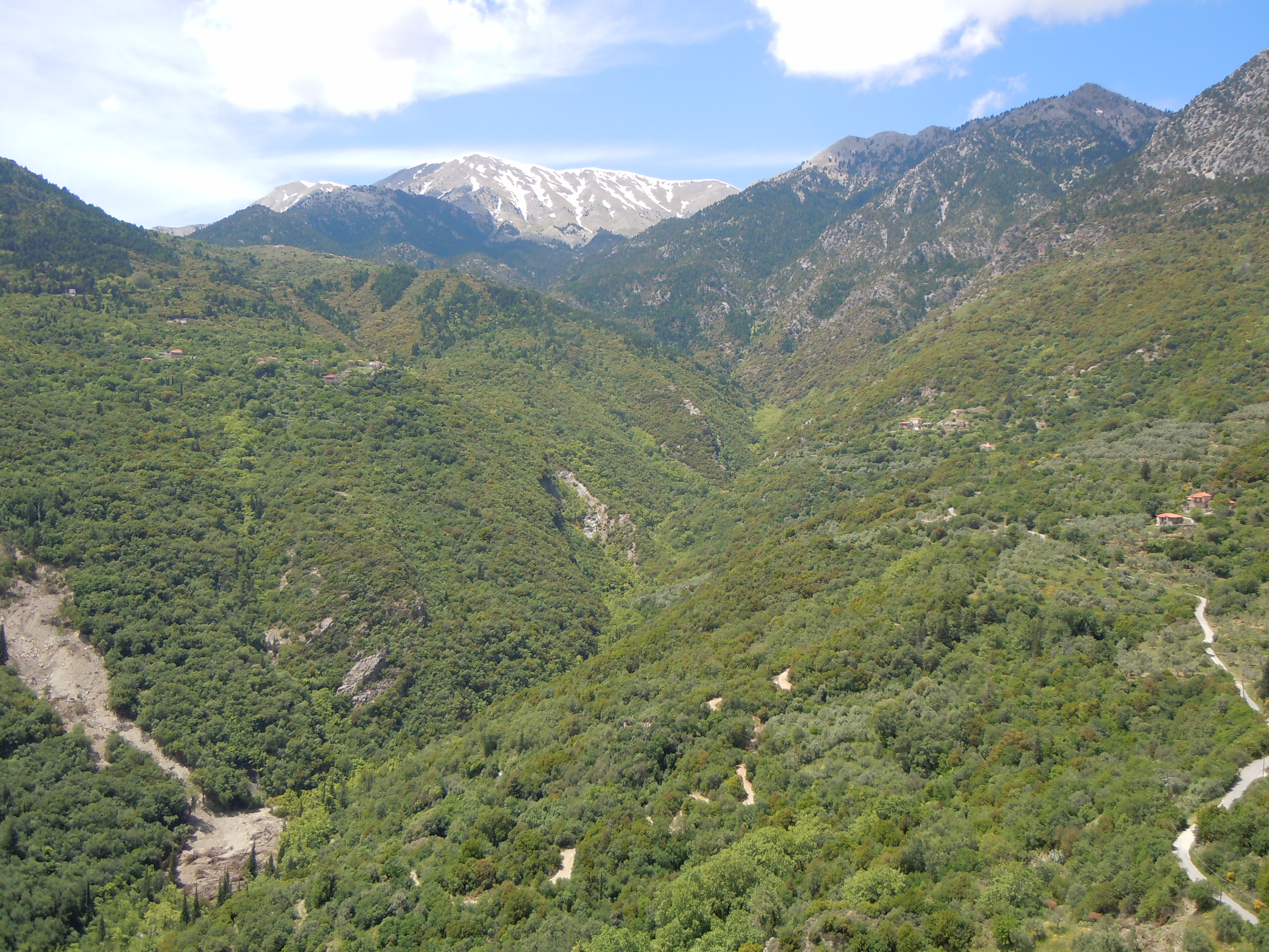 Vue du massif du massif du Taygète depuis le Chateau Villehardouin à Mistra